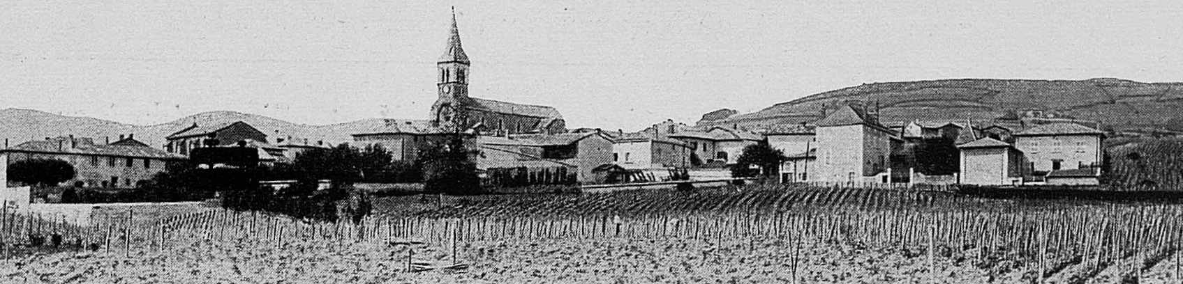 Dictionnaire illustré des communes du département du Rhône. Tome 1 / par MM. E. de Rolland et D. Clouzet.